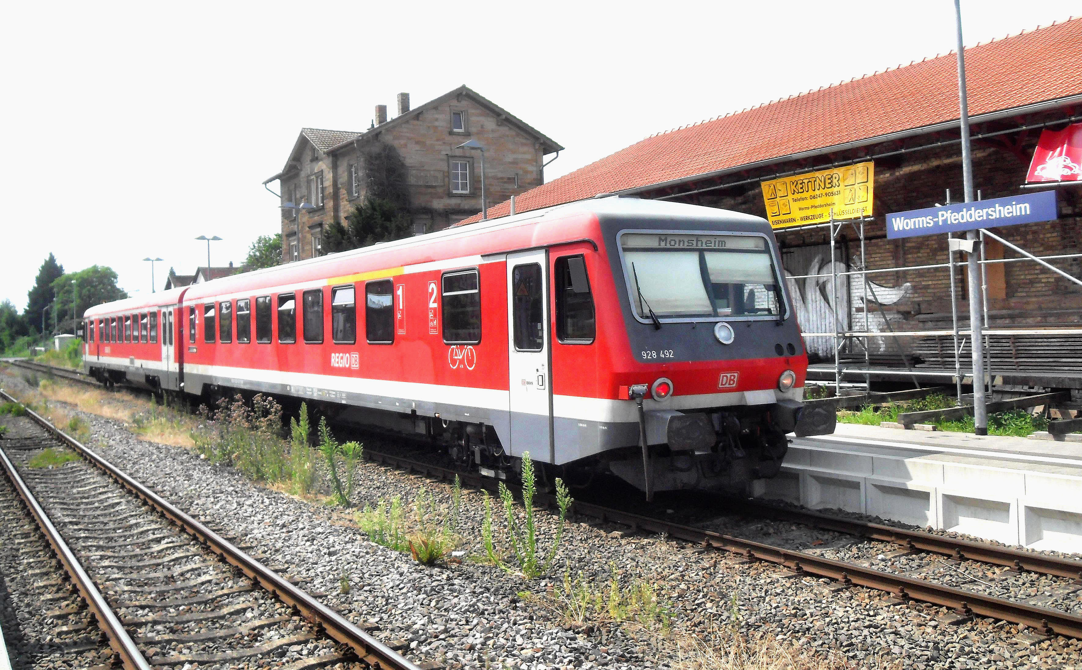 Regionalbahn mit Triebwagen der DB-Baureihe 628 im Worms-Pfeddersheimer Bahnhof auf der Rheinhessenbahn auf dem Weg nach Monsheim in Rheinland-Pfalz (Deutschland)